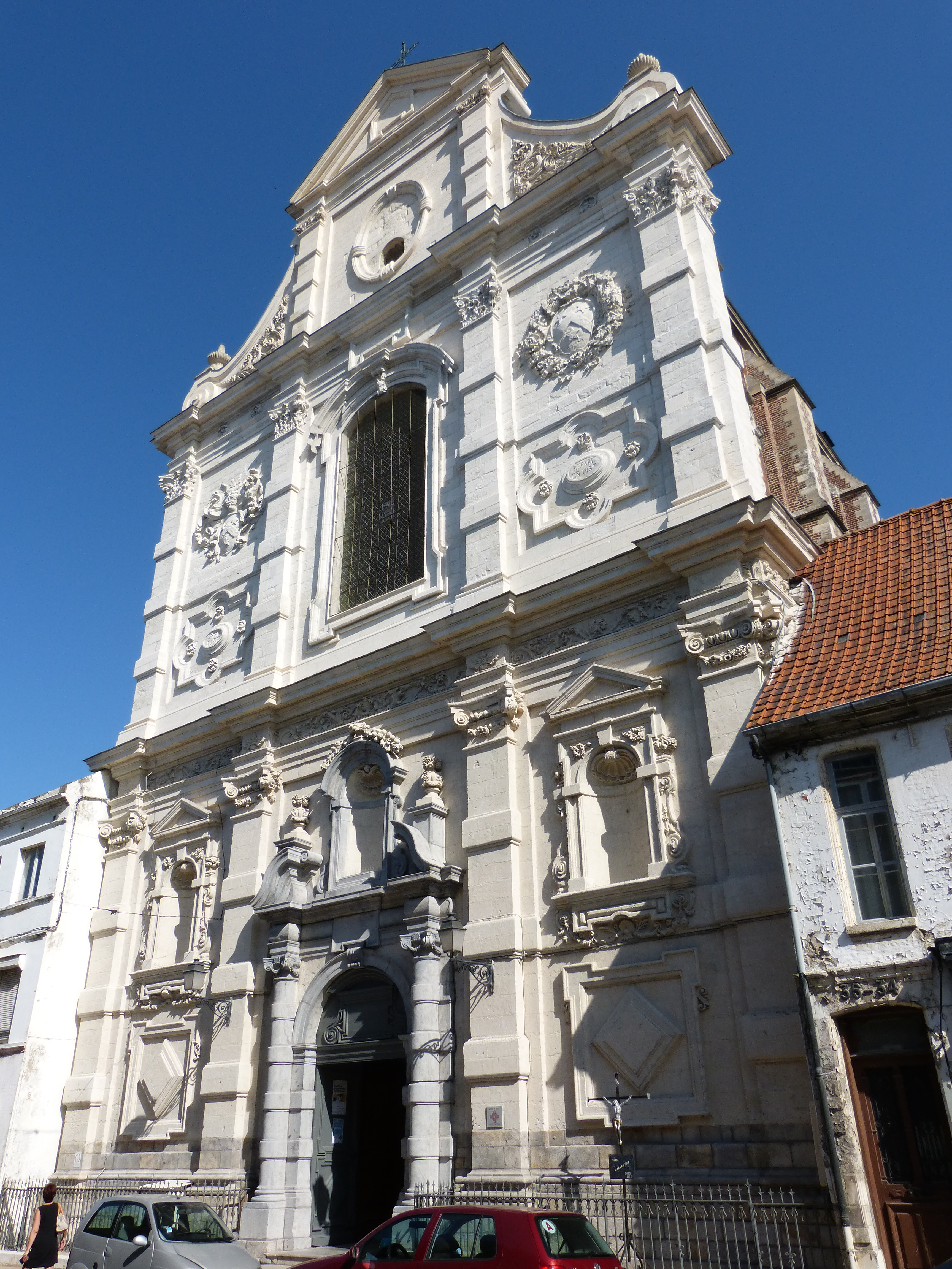 Vue de la chapelle Saint-Jacques depuis la rue de Saint-Omer